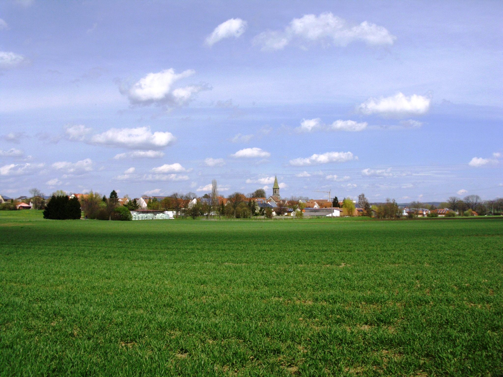 Sausenhofen, Ortsteil von Dittenheim in mittelfränkischen Landkreis Weißenburg-Gunzenhausen (Bayern)